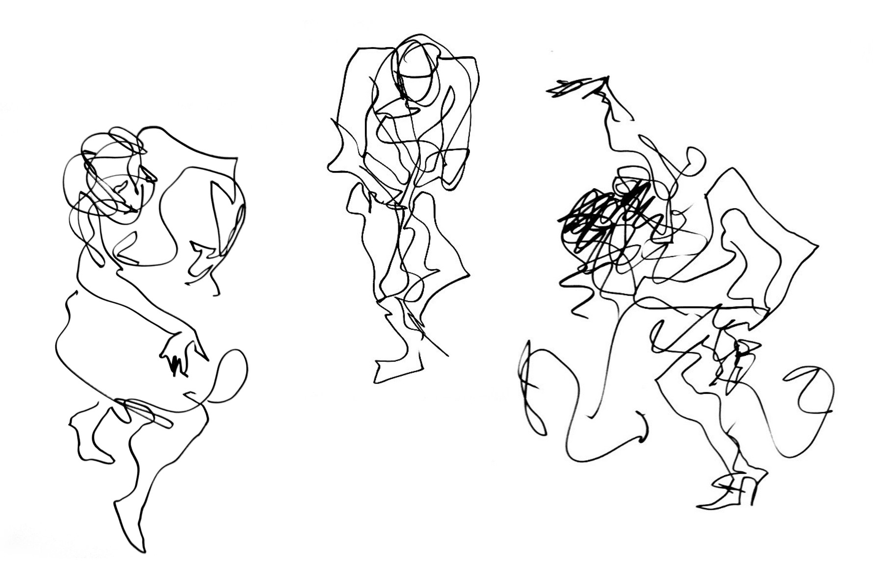 Tanz, Zeichnungen, Moje Menhardt, Tusche, Papier 61x46cm